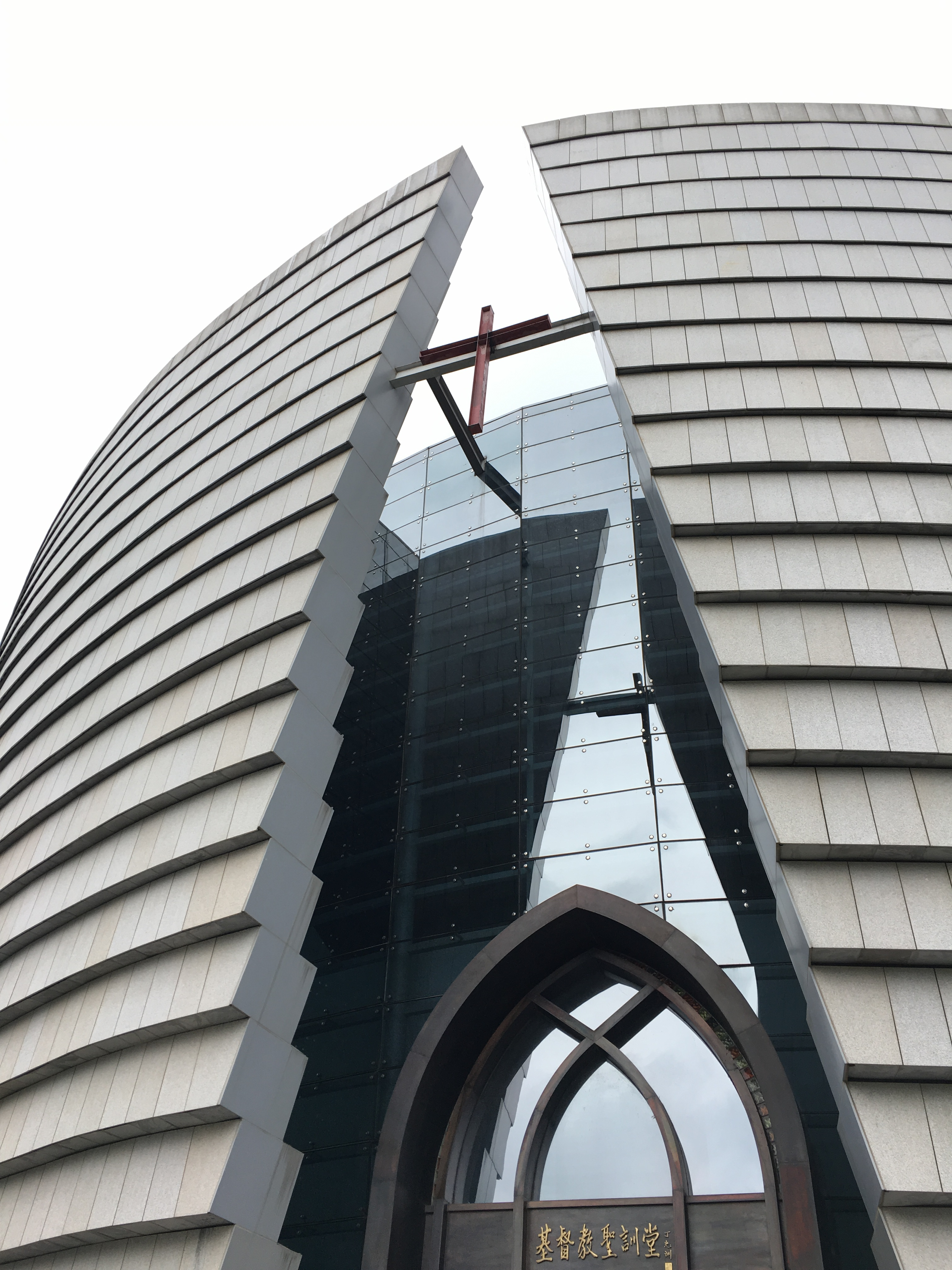 中文（中国大陆）: 南京基督教圣训堂正面造型